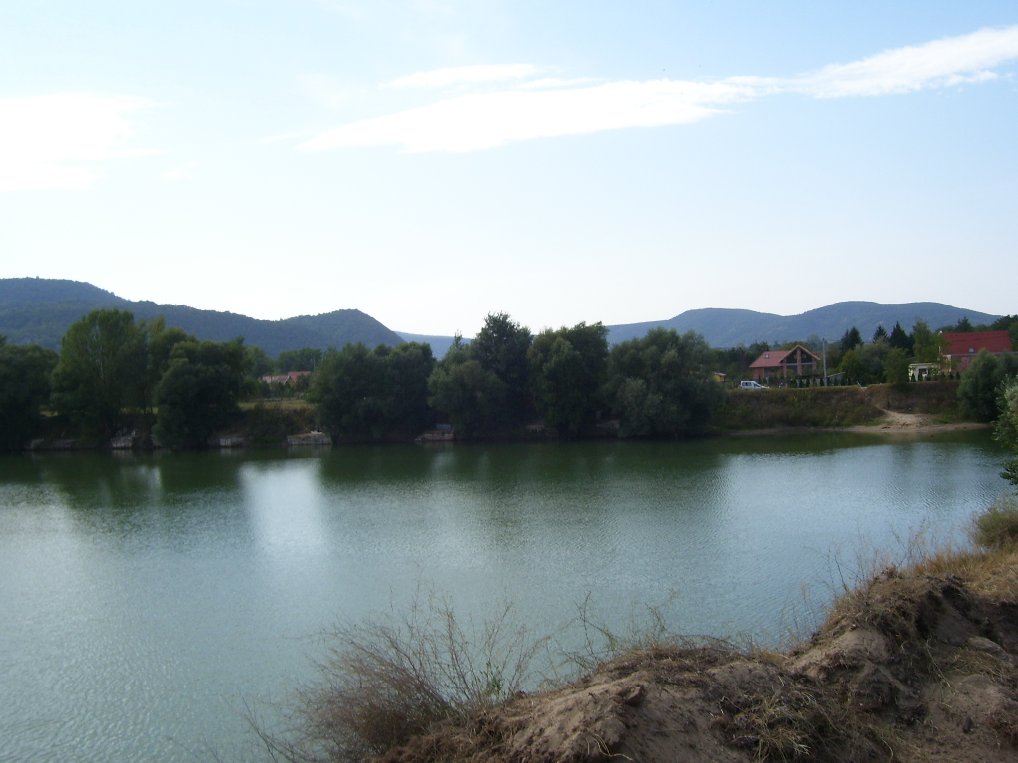 Kisoroszi, Cseres-tó (Pest megye)